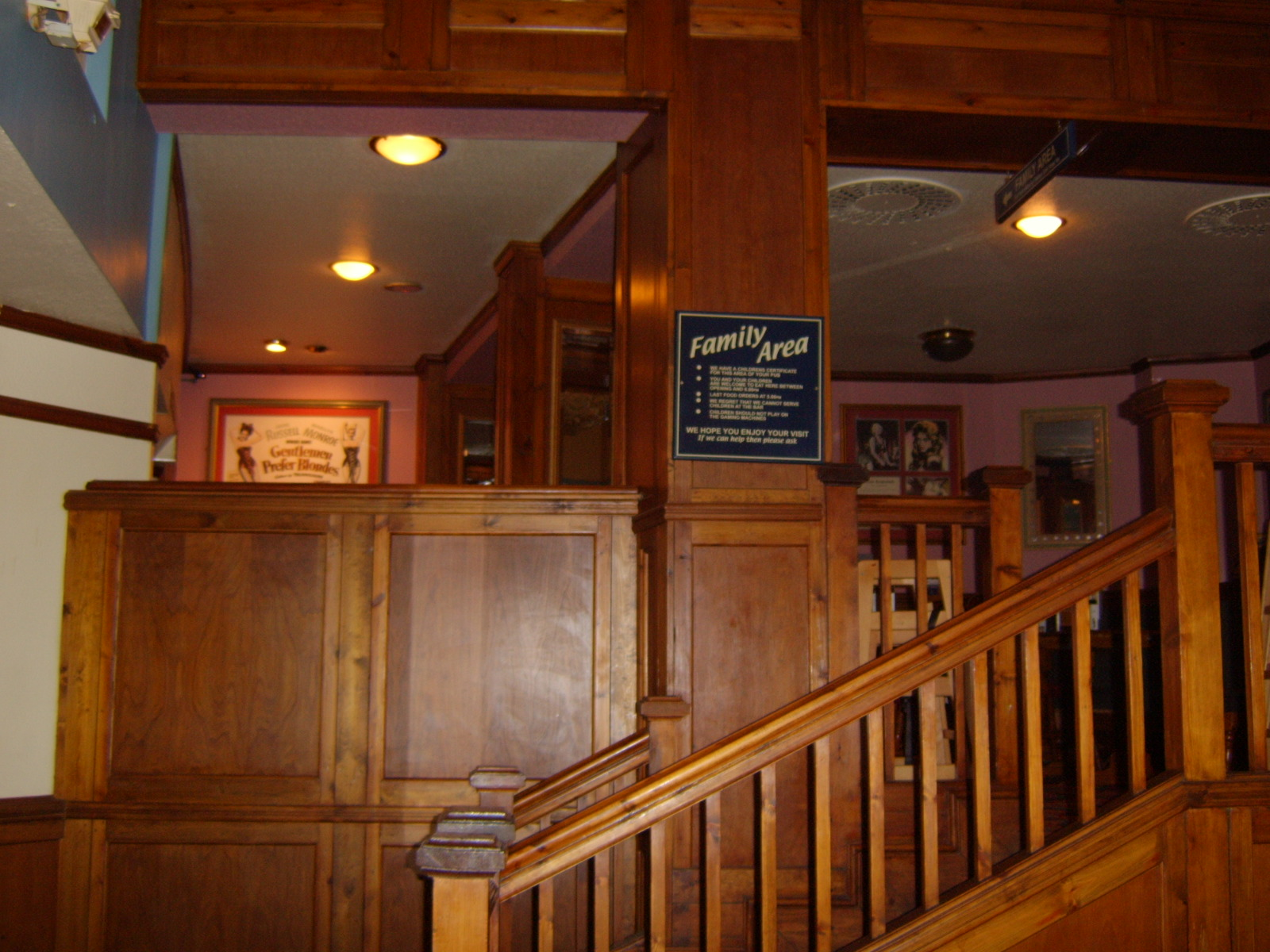 Pubbelső valahol Angliában